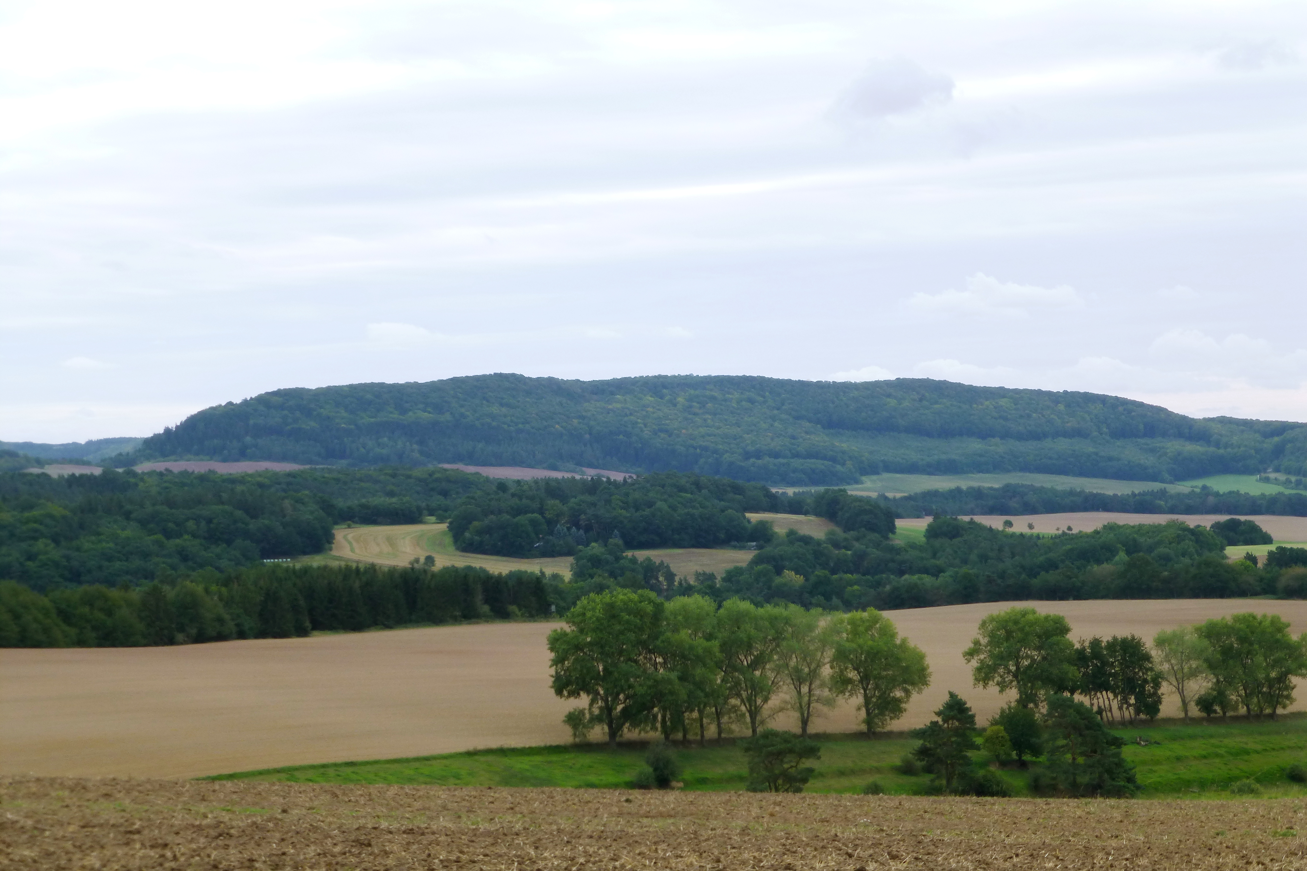 Blick von Nordnordwesten bei Kirchgandern auf die Hennefeste